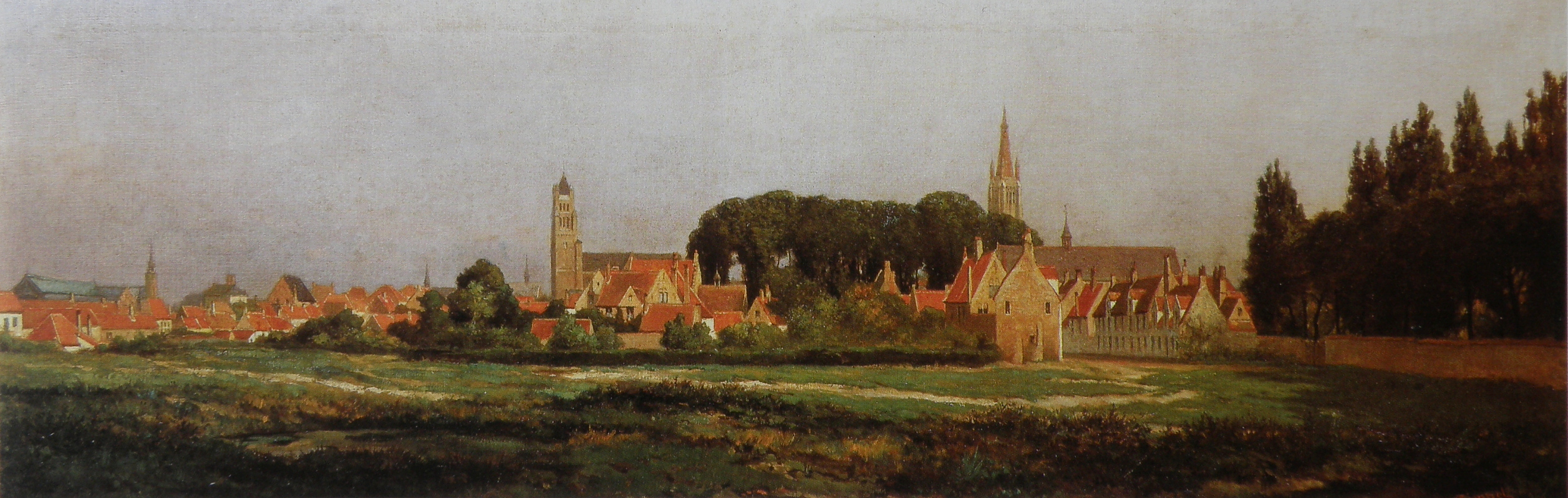 Bruno De Simpel (1832-1902), "Vue du béguinage depuis le sud" (1886). Stedelijke Musea, Brugge.